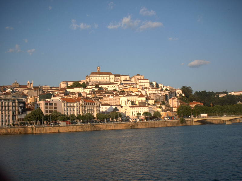 Coimbra vista desde la orilla opuesta del río Mondego. Fotografía realizada por: Ángel Serrano Sánchez de León